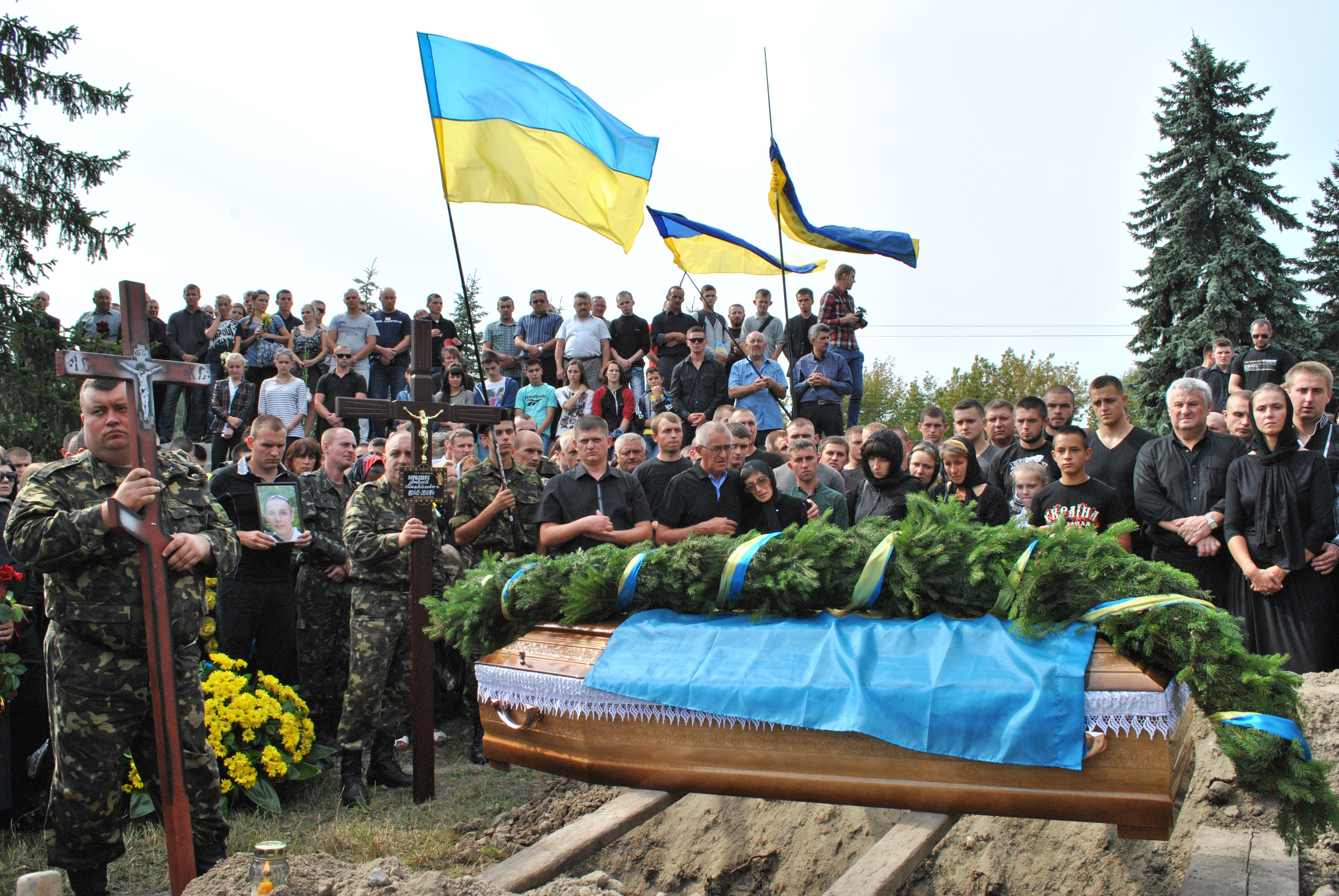 Похорон командира 2-го взводу 2-ї роти «Захід» 24-го батальйону територіальної оборони «Айдар», активного учасника Революції гідності Юркевича Андрія Михайловича на Микулинецькому цвинтарі Тернополя 11 вересня 2014 року.